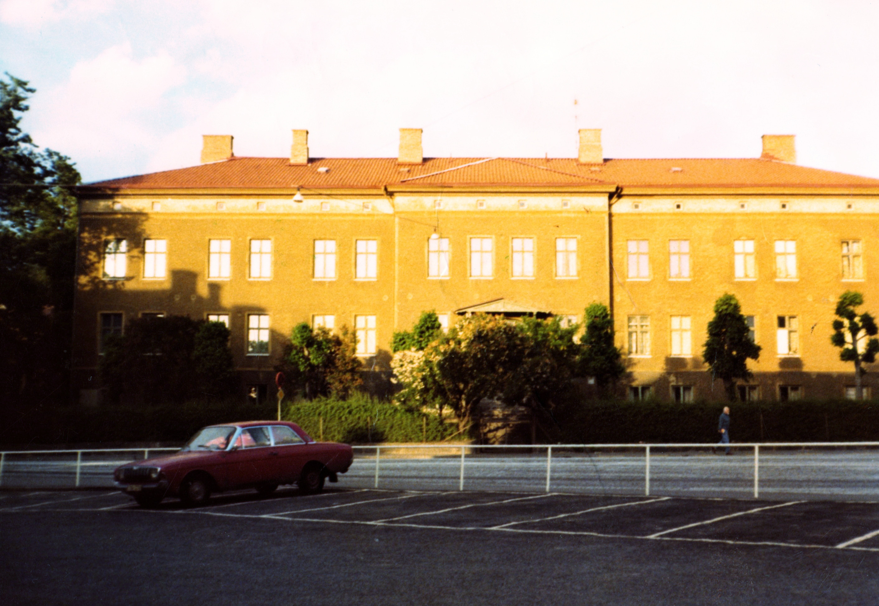 Sprängkullshemmet (1976), före Handelshögskolebygget